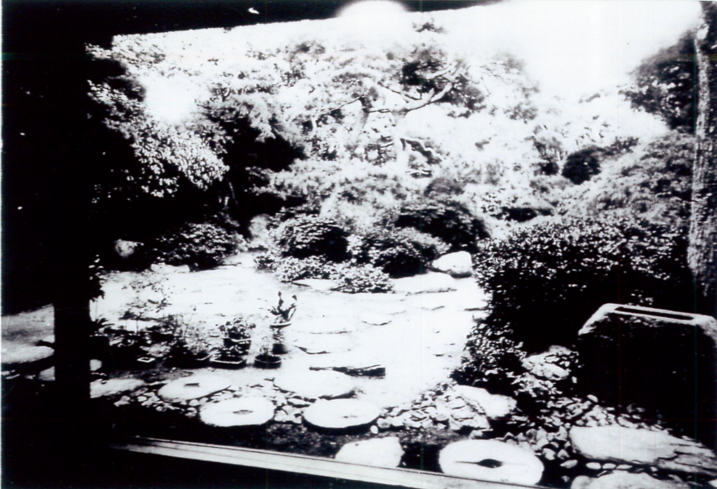 二木謙三の生家の中の間より庭を望む